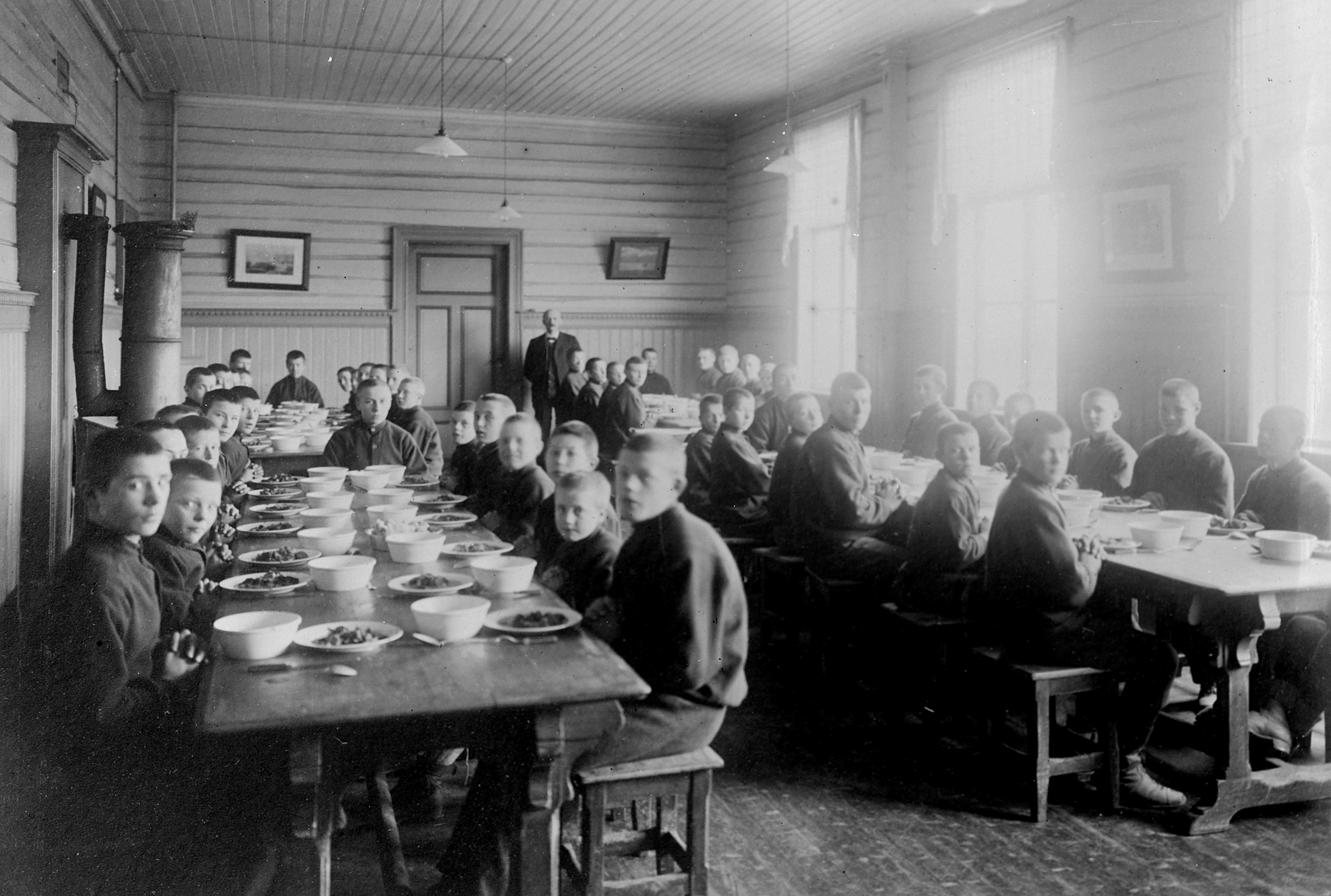 Skolehjemsgutter i spisesalen på Falstad skolehjem. Lærer i bakgrunnen...Pupils in the dining room at Falstad reformative school. Teacher in the background...Dato / Date: ca. 1915.Fotograf / Photographer: Bjerkan.Sted / Place: Falstad, Ekne, Nord-Trøndelag, Norge/Norway.Arkivreferanse /Archive reference: 0800335.